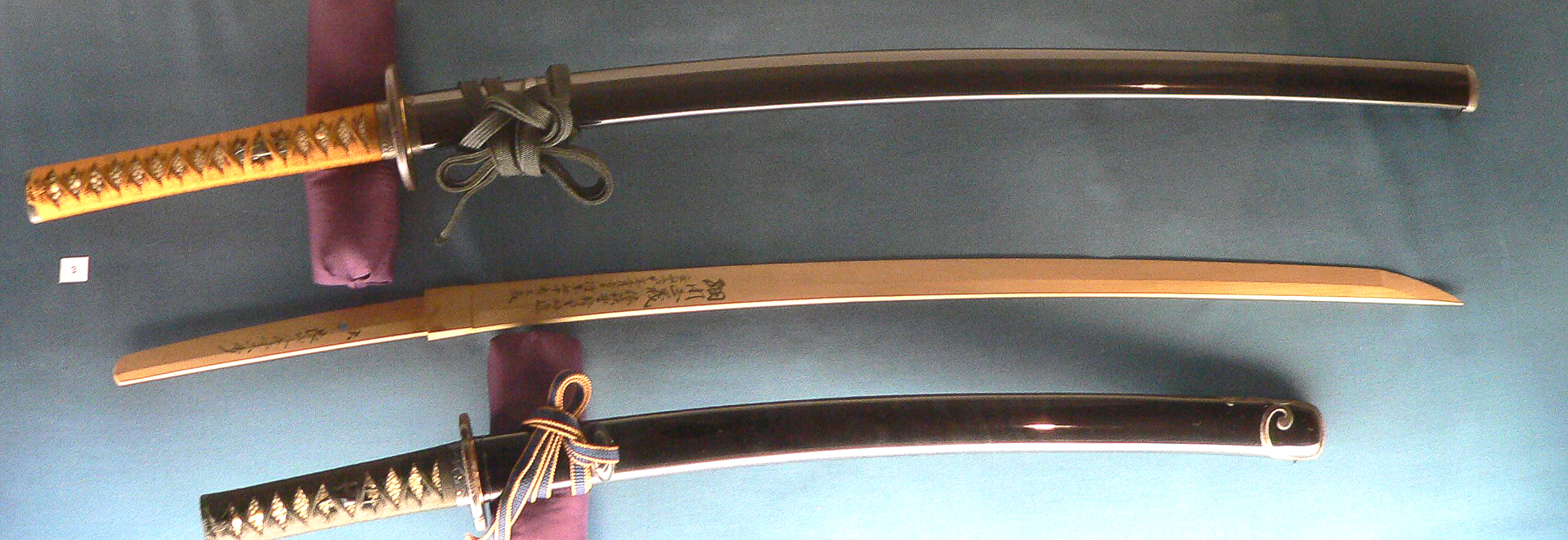 saya et lame factice en bois pour maintenir le fourreau en forme lorsque la lame est entreposée dans son fourreau de rangement.